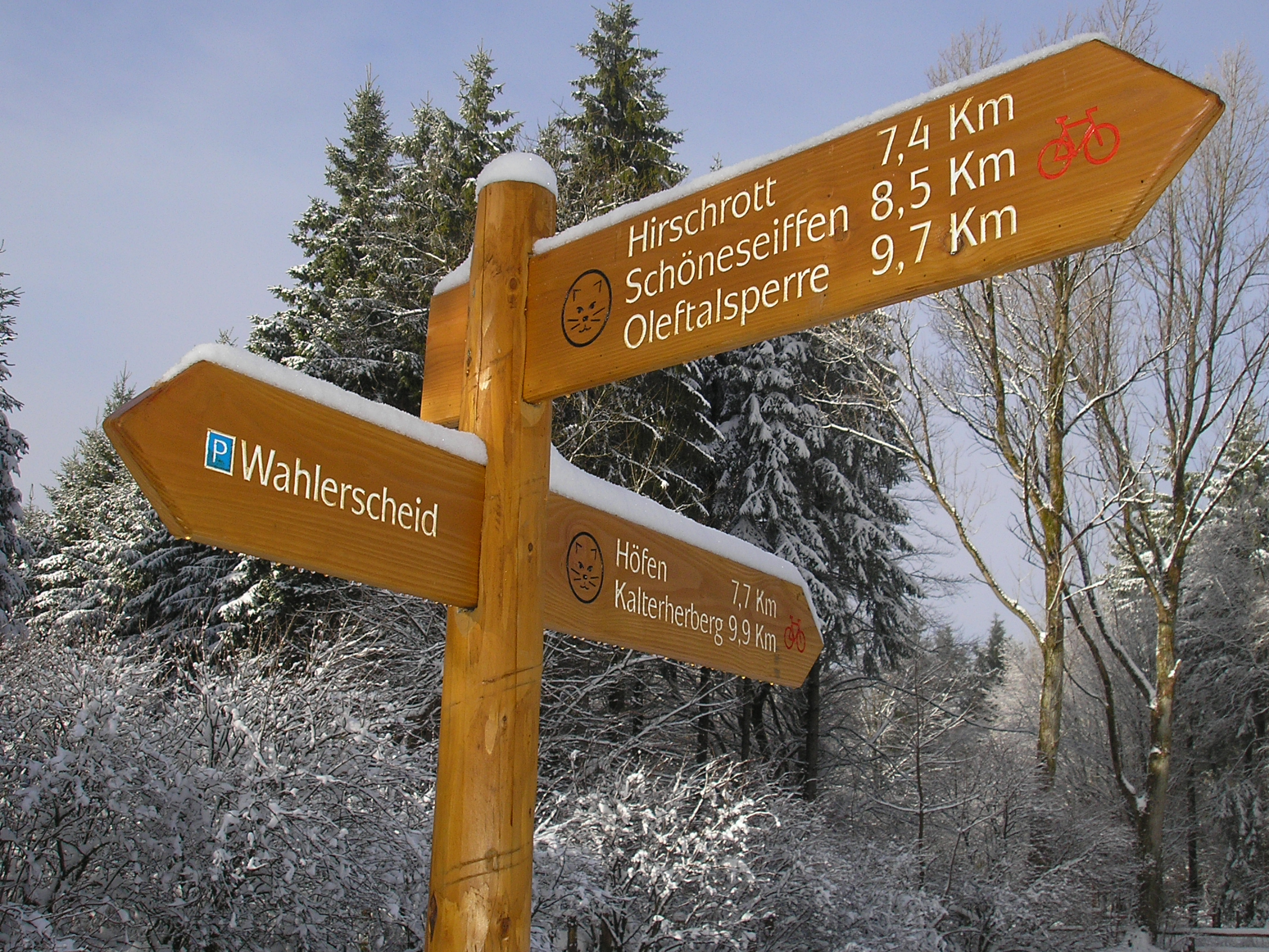 Wegweiser im Nationalpark Eifel, Parkplatz Wahlerscheid